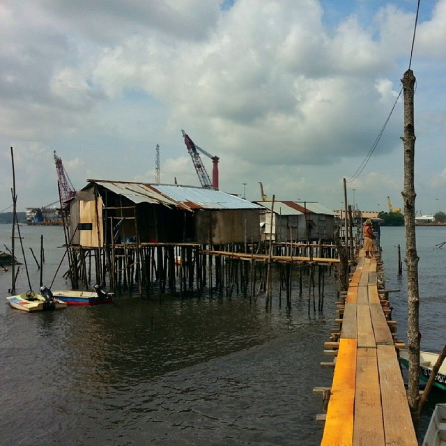 Orang Seletar